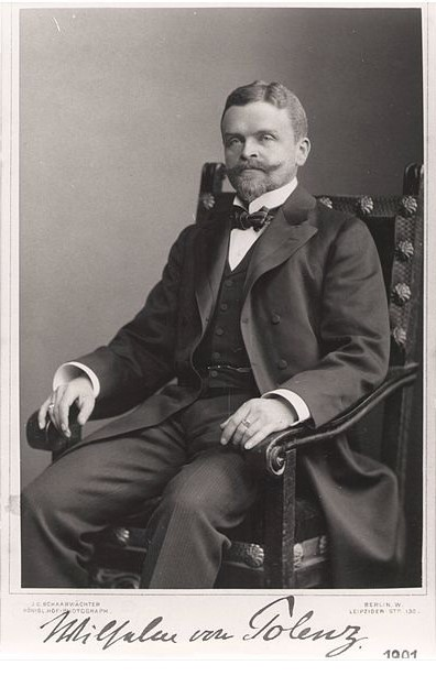 Porträt des Dichters Wilhelm von Polenz